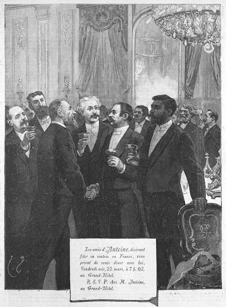 "M. Antoine à Paris". Autour d'Antoine : Goudchaux, Siebecker, Émile Richard et Gerville-Réache.